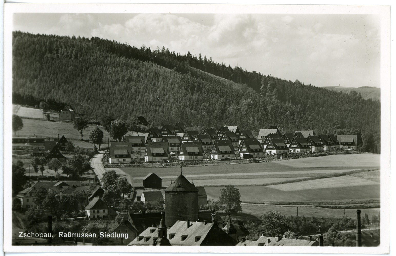 Zschopau; Raßmussen - Siedlung This postcard is from publisher Brück & Sohn in Meißen ( postcard has a unique number 25974 and is available in a higher resolution at the publisher. This images was uploaded in a cooperation project between Wikipedians and the publisher.